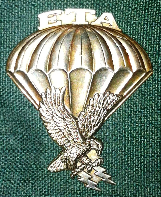 Το διακριτικό "Ε.Τ.Α." για όλες τις στολές πλην της αρ.9